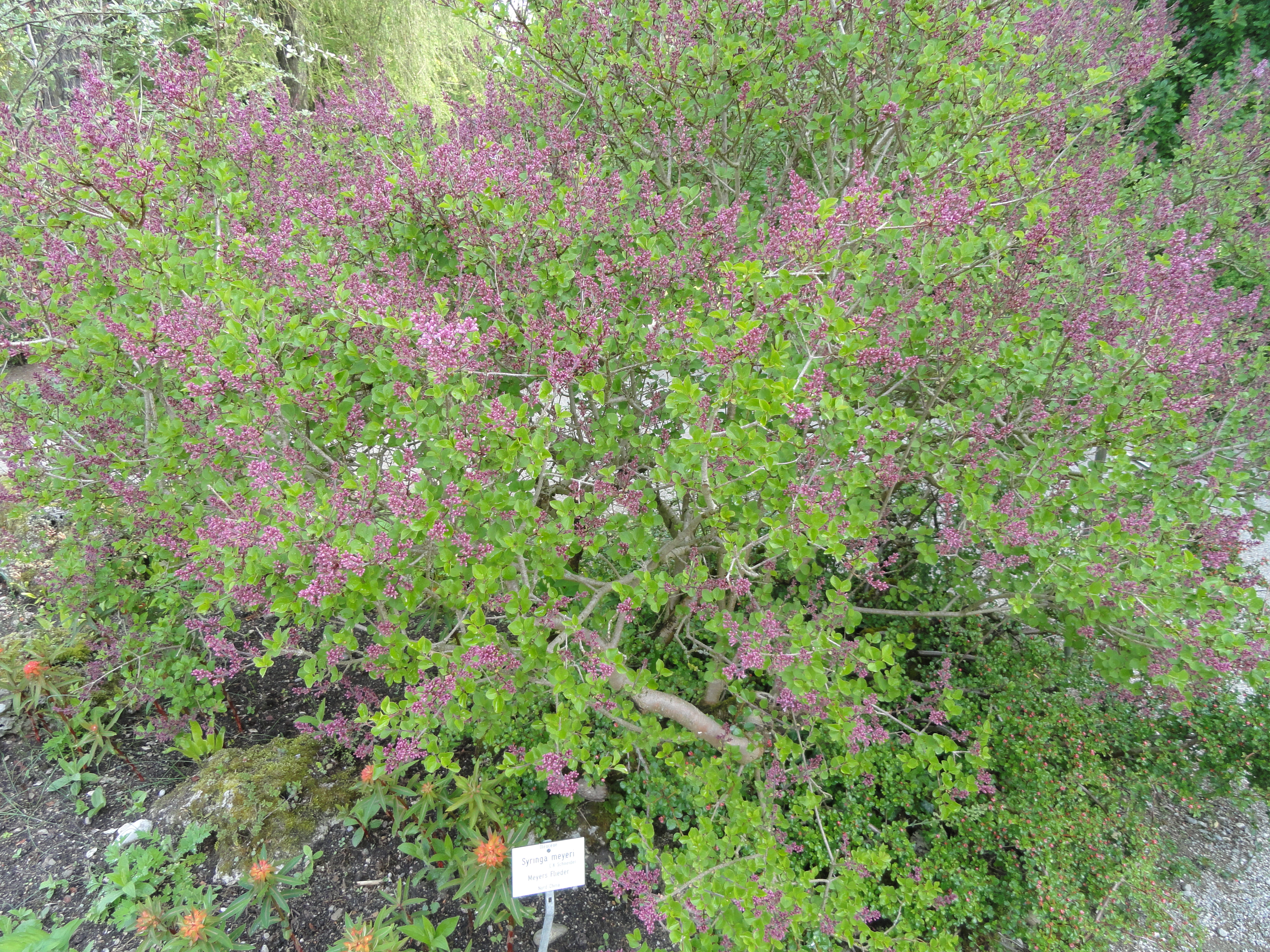 Syringa meyeri specimen in the Botanischer Garten München-Nymphenburg, Munich, Germany.